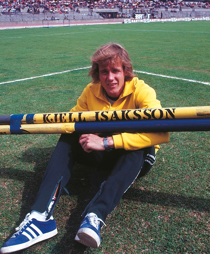 Kjell Isaksson, 1972 Olympics